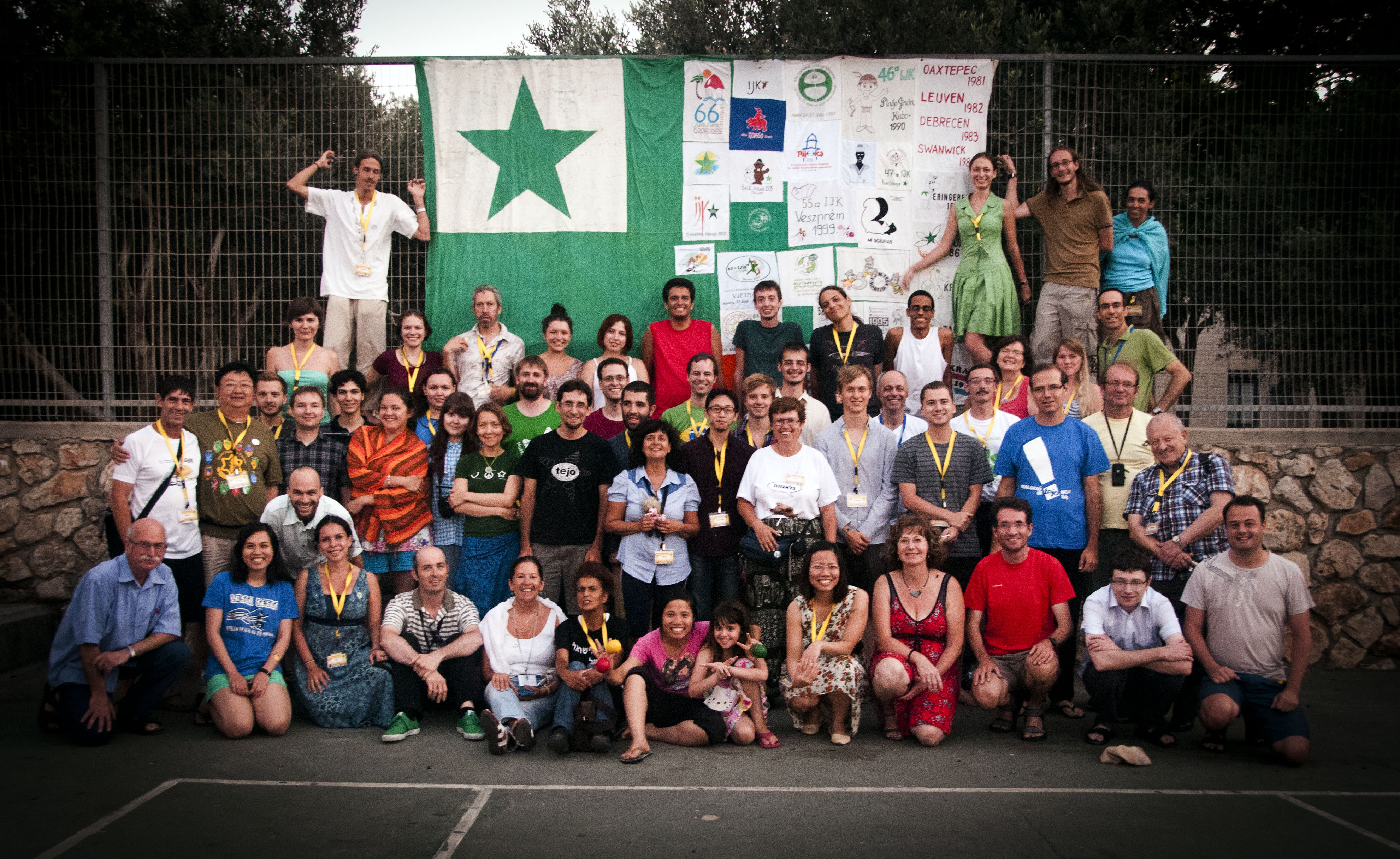 Grupa foto de la partoprenantoj de 69a IJK, farita en Nazareto, Israelo